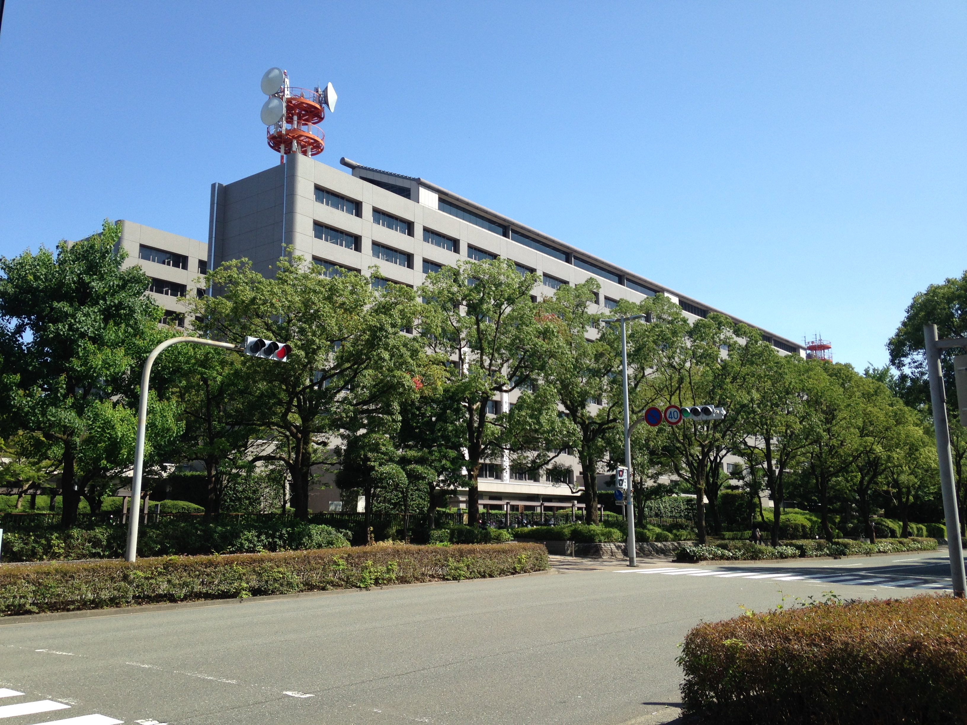 福岡県庁舎